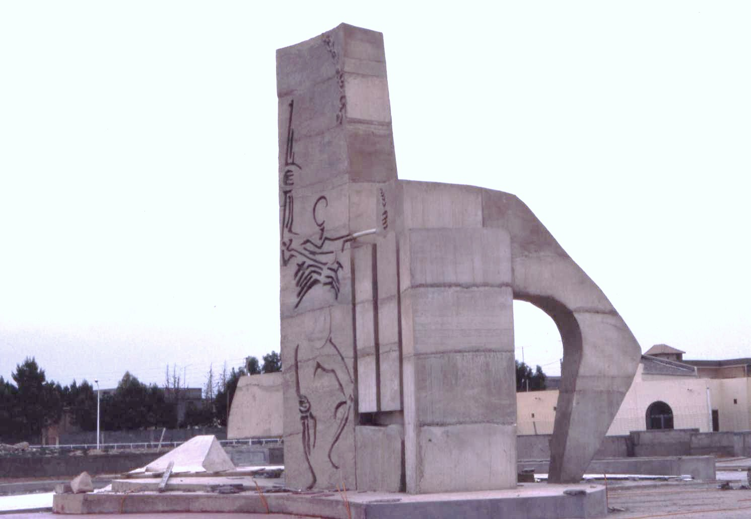 Monument aux martyrs, sculpture (en construction) du peintre Mohammed Khadda à M'Sila, Algérie.